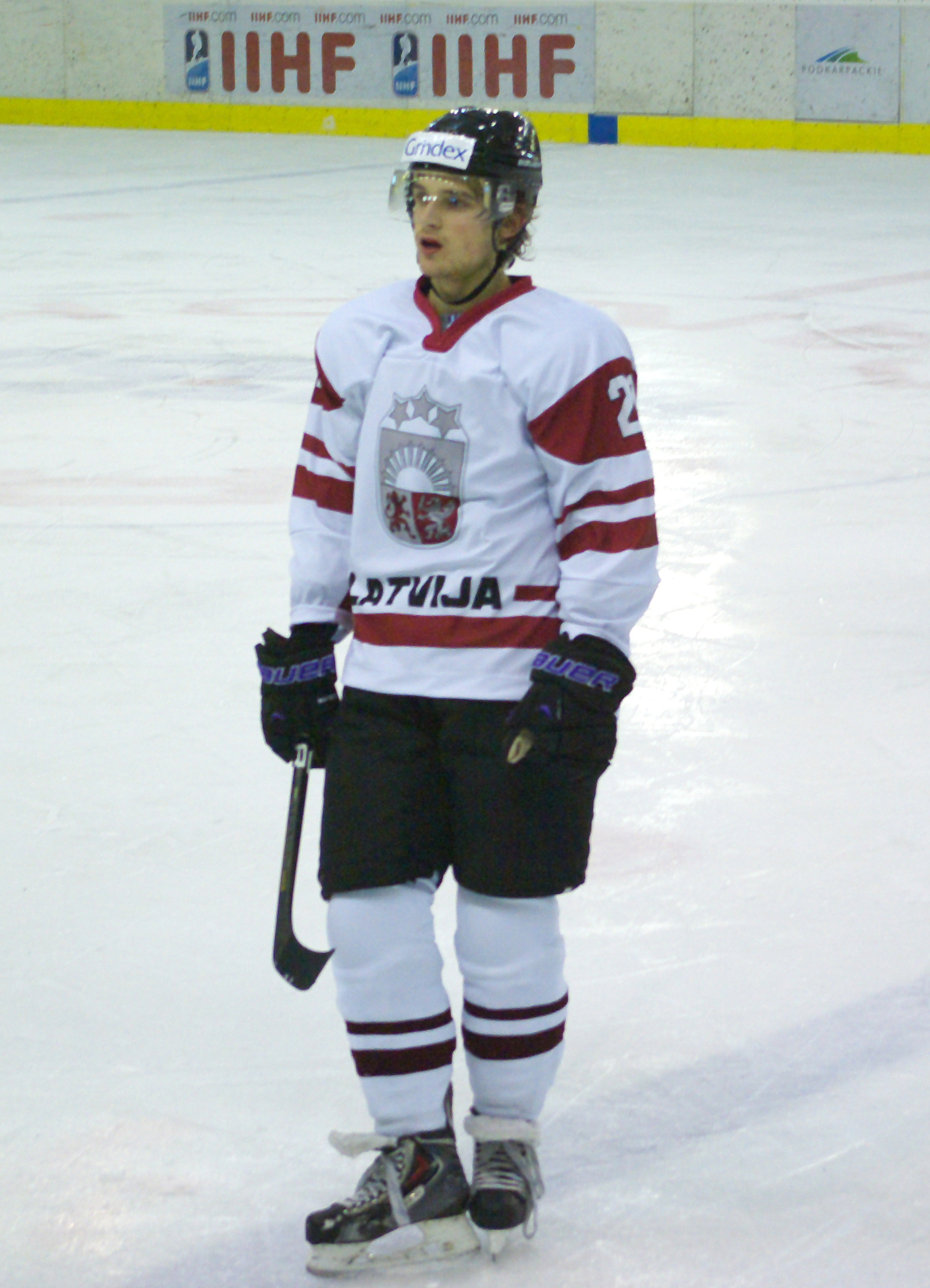 podczas Mistrzostw Świata Juniorów w Hokeju na Lodzie 2014 I Dywizji w Sanoku, Dania - Łotwa 4:1, Arena Sanok 19 grudnia 2013